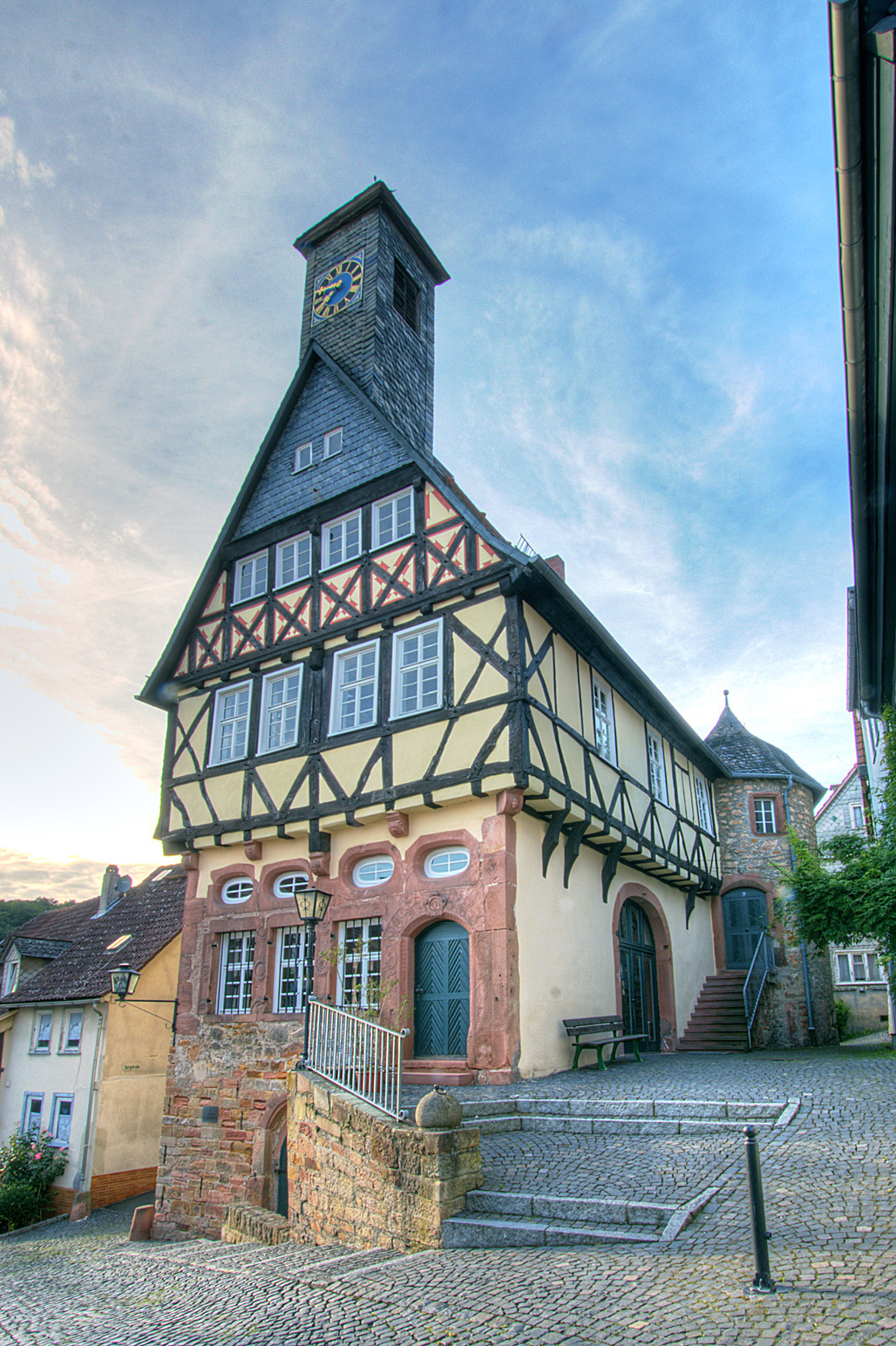 Alten Rathaus in Ortenberg im Wetteraukreis in Deutschland